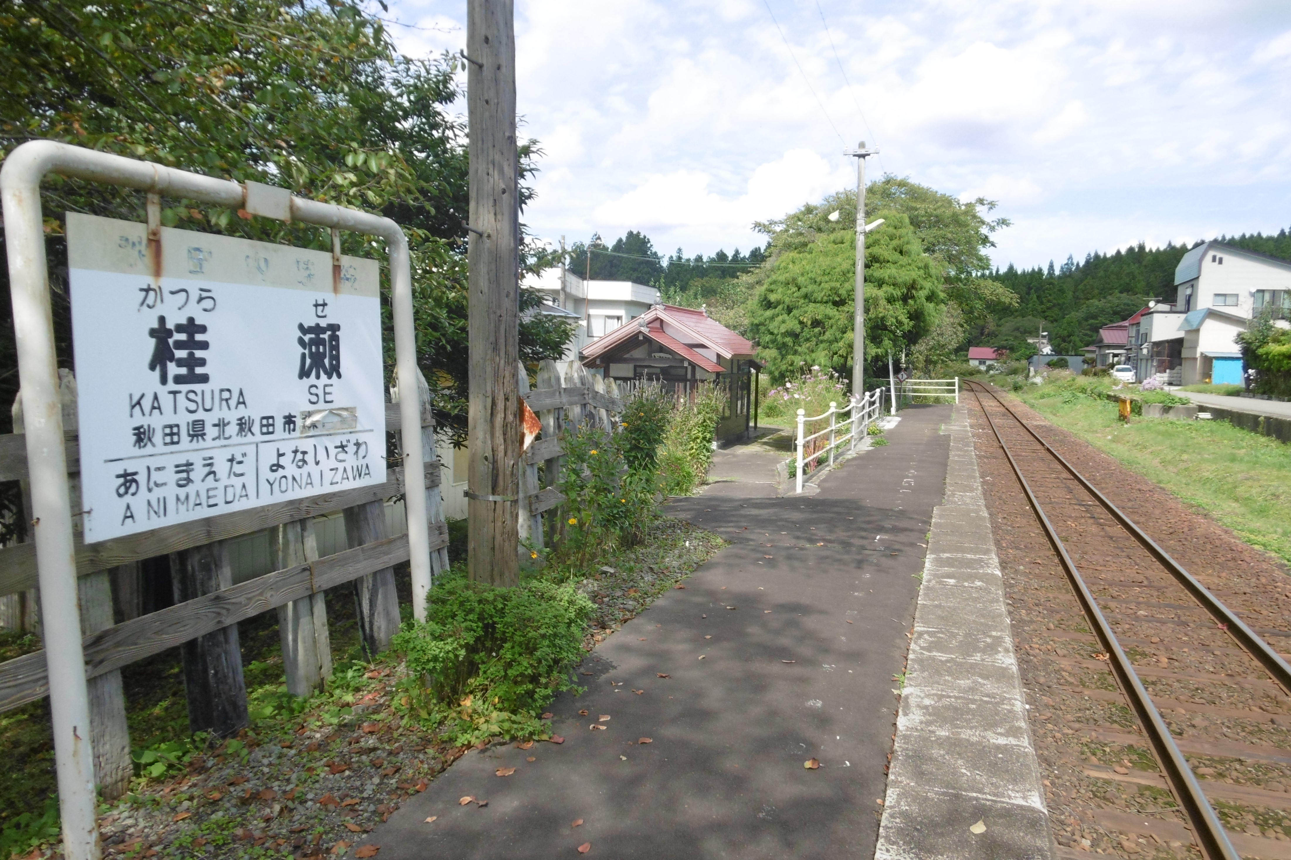 秋田内陸線・桂瀬駅